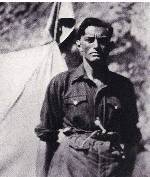 Leopoldo Gasparotto, un uomo dAzione